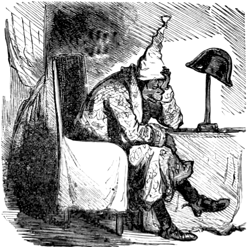 L’ambassadeur ayant persisté à se faire payer sa petite note, Soulouque entre dans son cabinet pour réfléchir aux moyens de se procurer de l’argent, mais il se procure seulement une violente migraine.